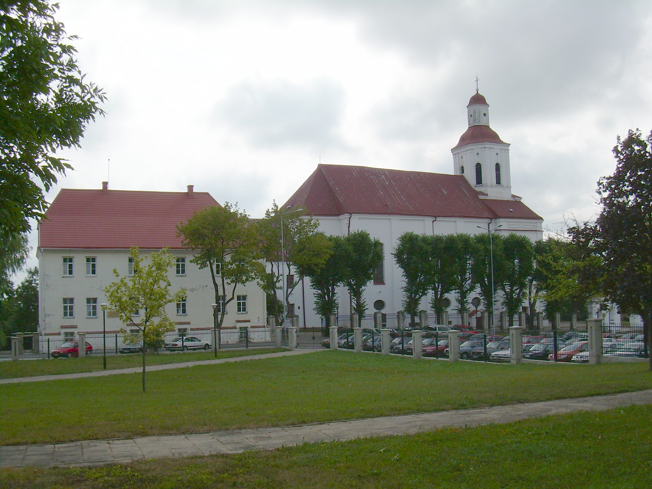 Telšių Šv. Antano Paduviečio katedra